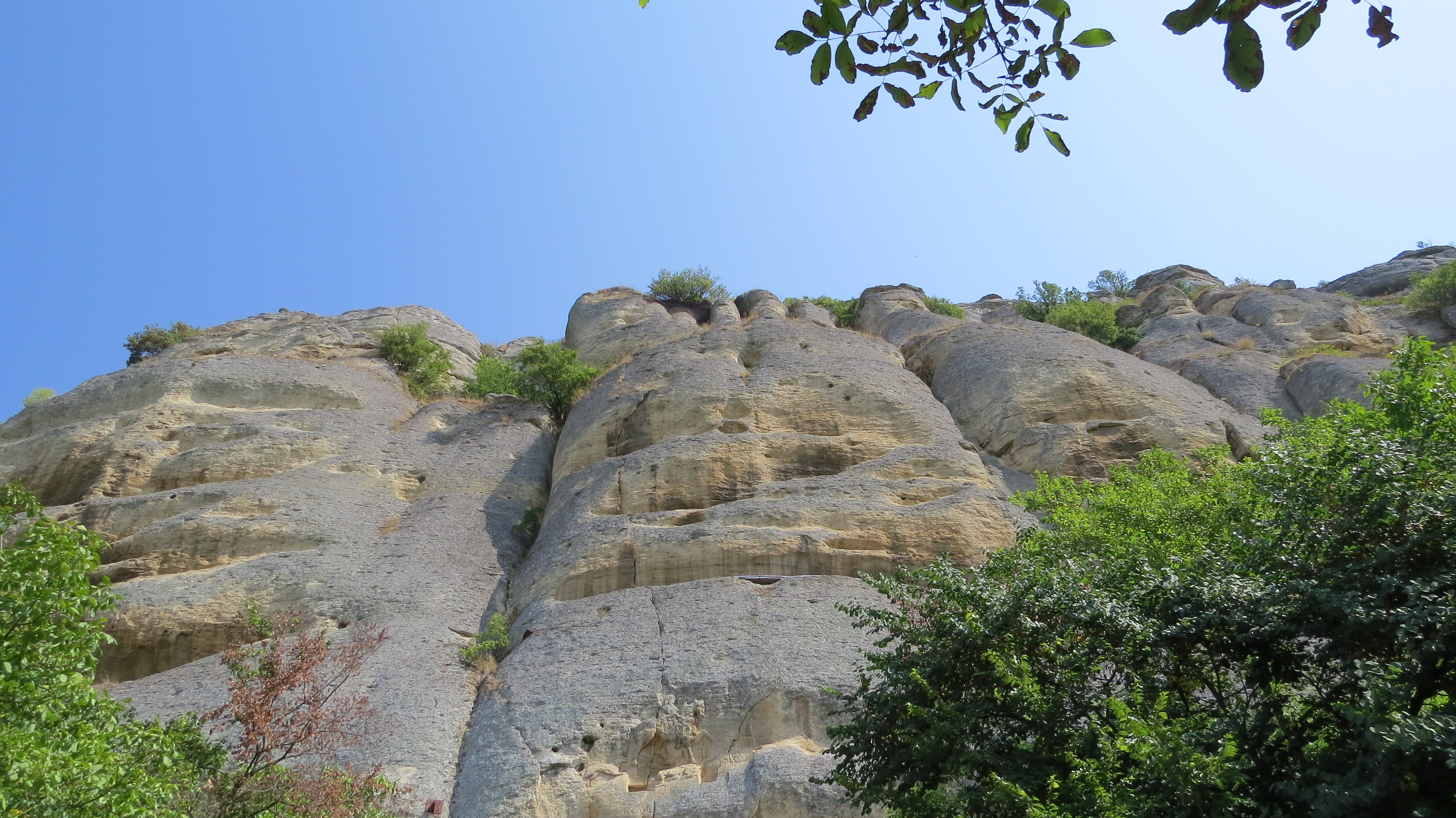 Sto metrov visoka skoraj navpična stena z reliefom Madarskega konjenika